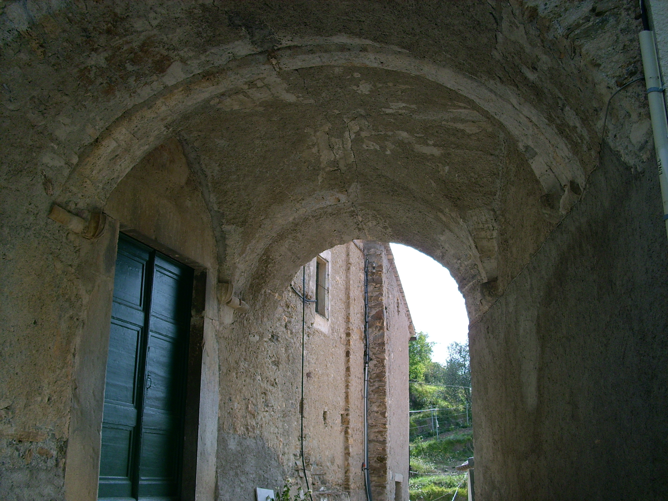 Pornassio, Liguria, Italia